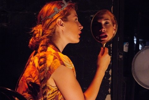 מתוך ההצגה "דודה פרידה: מוזיאון", מאת ובבימויה של נעמי יואלי